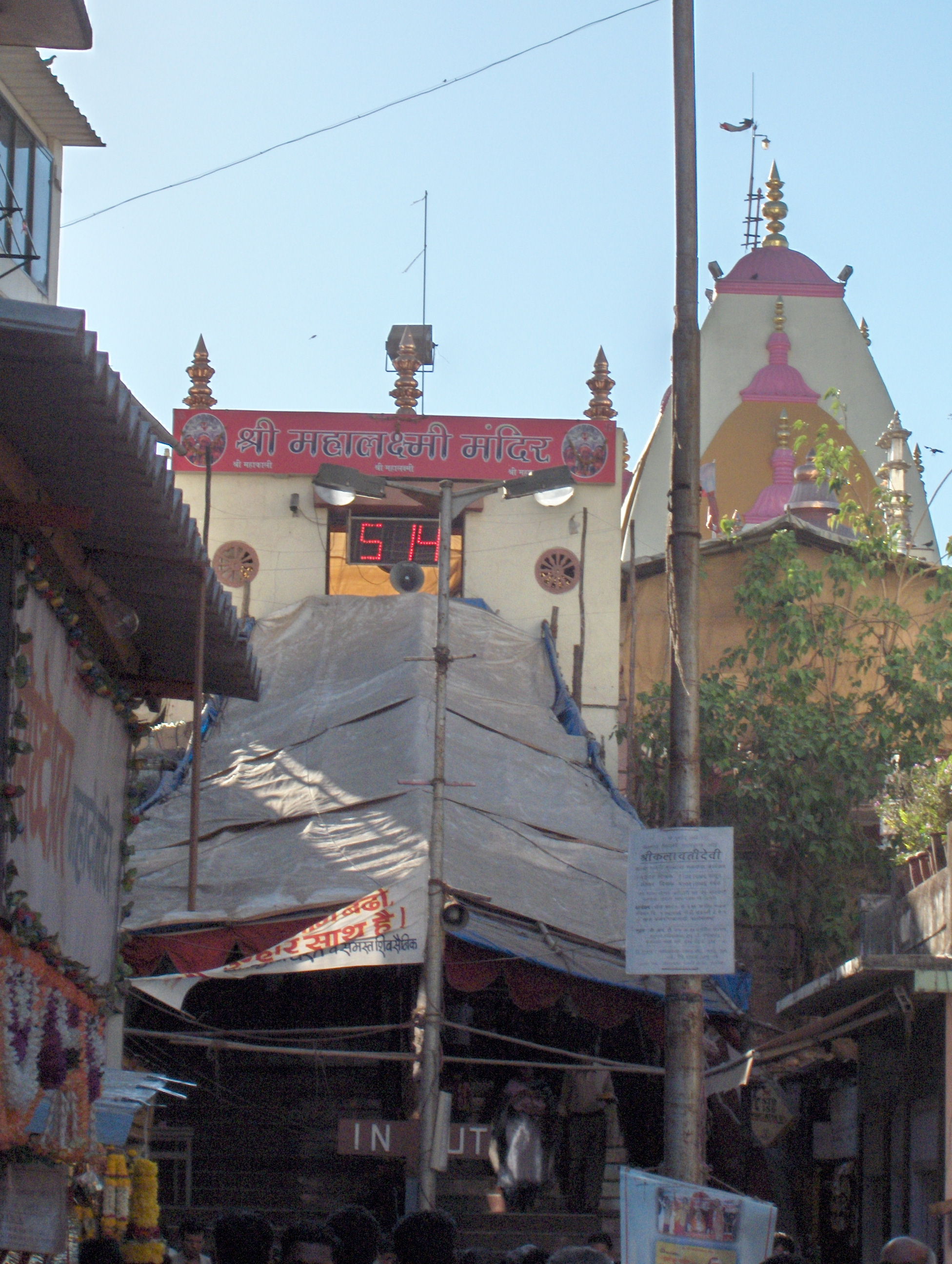 Mahalaxmi temple in Mumbai Image taken by me, Nichalp on 4-Mar-06